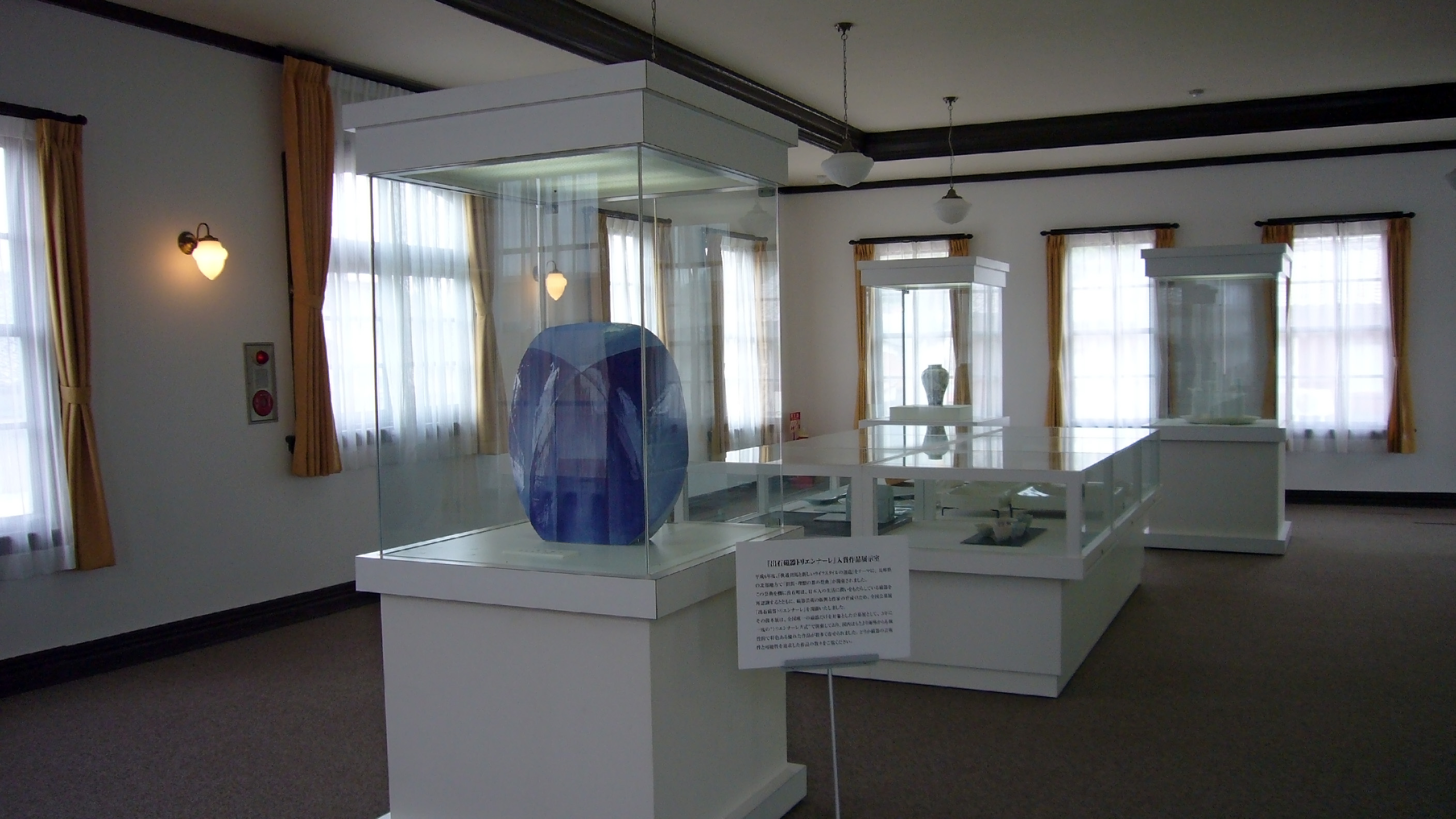 Meiji-Kan in Toyooka, Hyogo, Japan